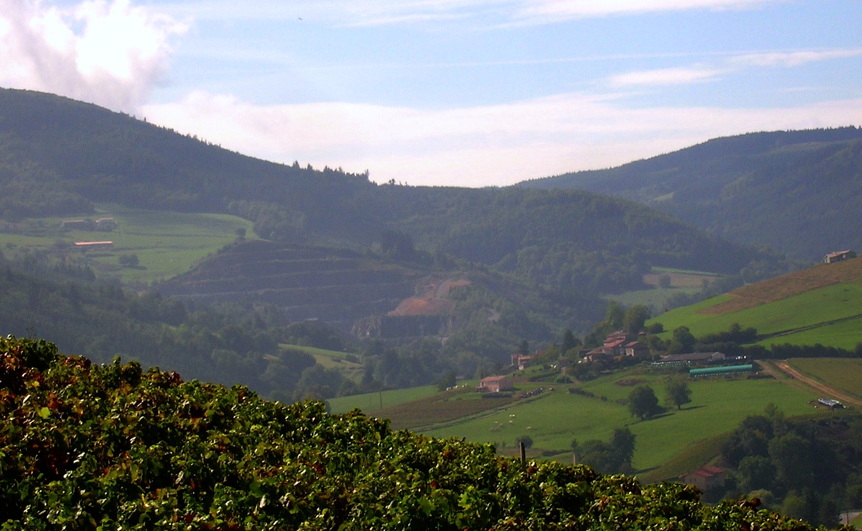 Saint-Didier-sur-Beaujeu, Rhône, France.